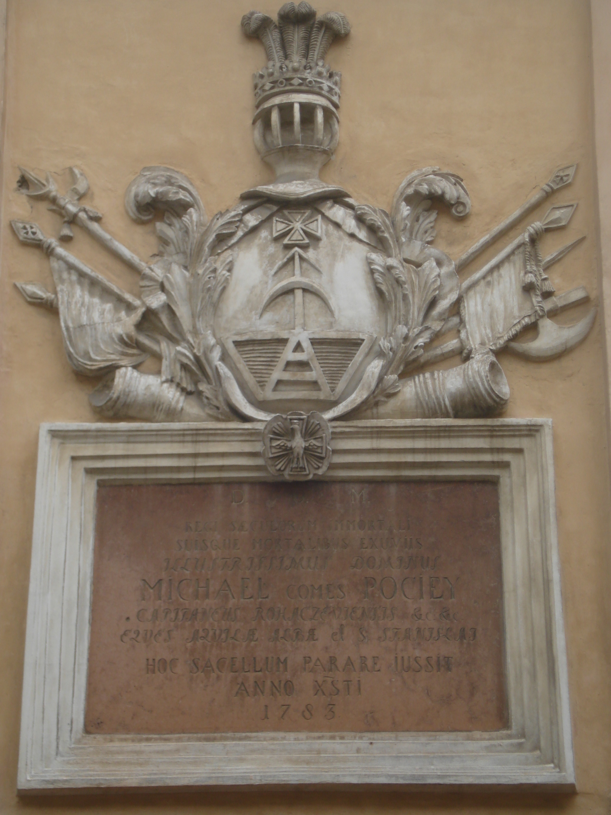 Plaque on the cappella by Pociej Family of the Church of St. Teresa in Vilnius (Tablica erekcyjna, kaplica-mauzoleum Pociejów kościołu św. Teresy, wybudowana w 1783). Aušros Vartų g. 14